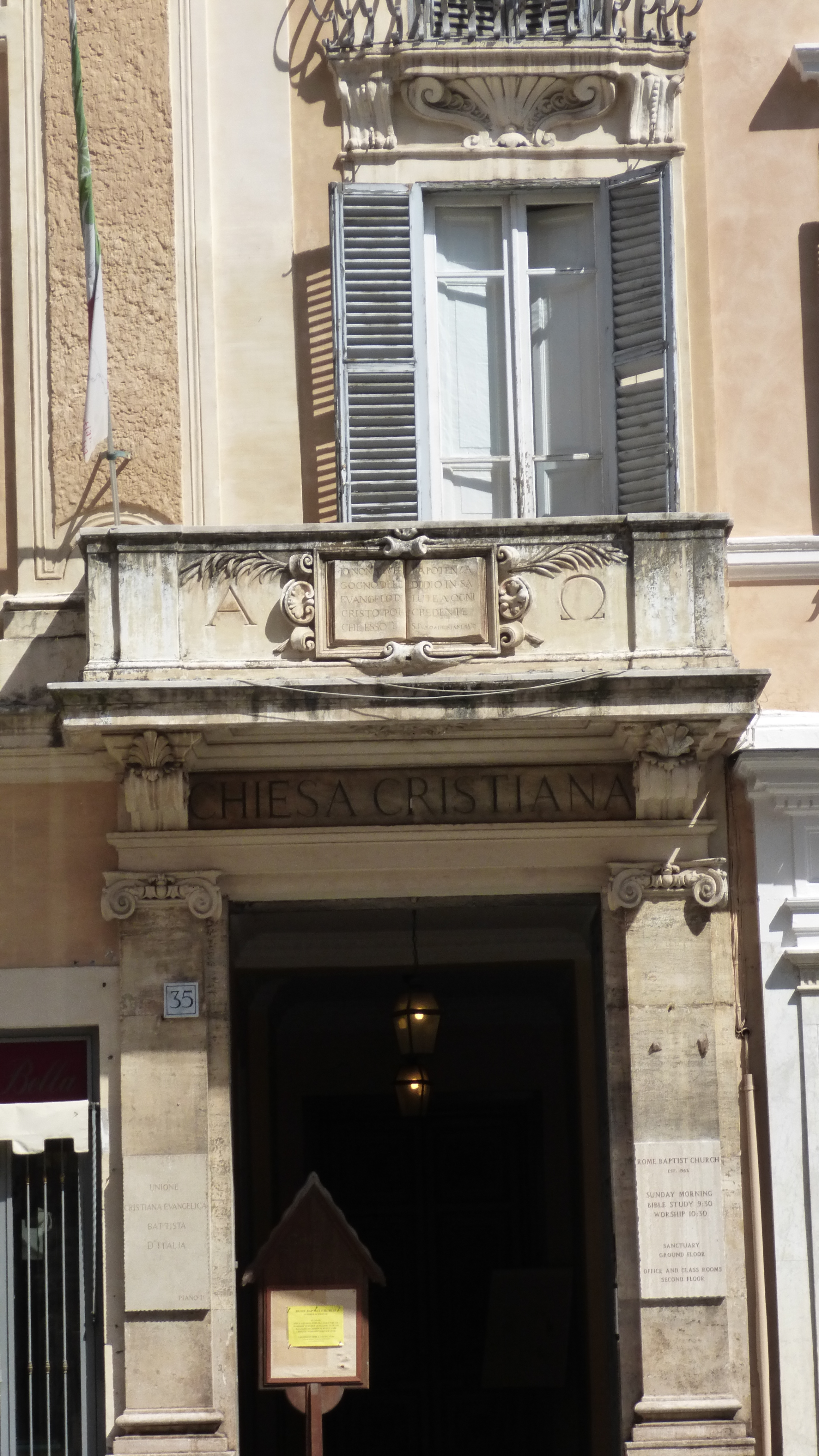 Roma, piazza S. Lorenzo in Lucina lato Campo Marzio. Chiesa cristiana battista.